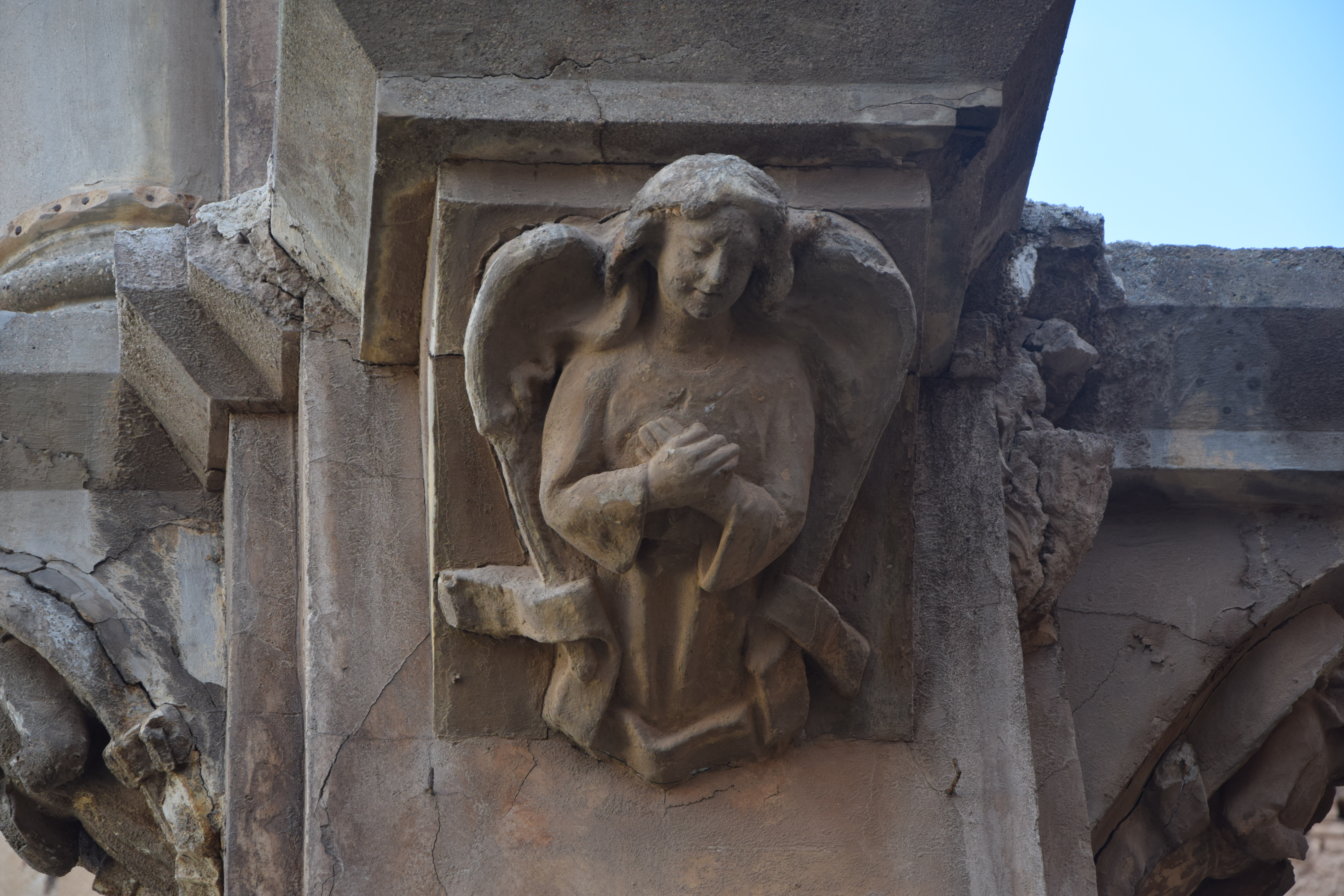 Detalle de una de las columnas de la Catedral de Cartagena España